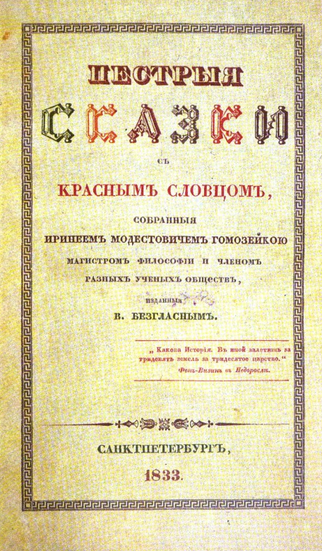 Pestré pohádky Vladimaira Odojevského